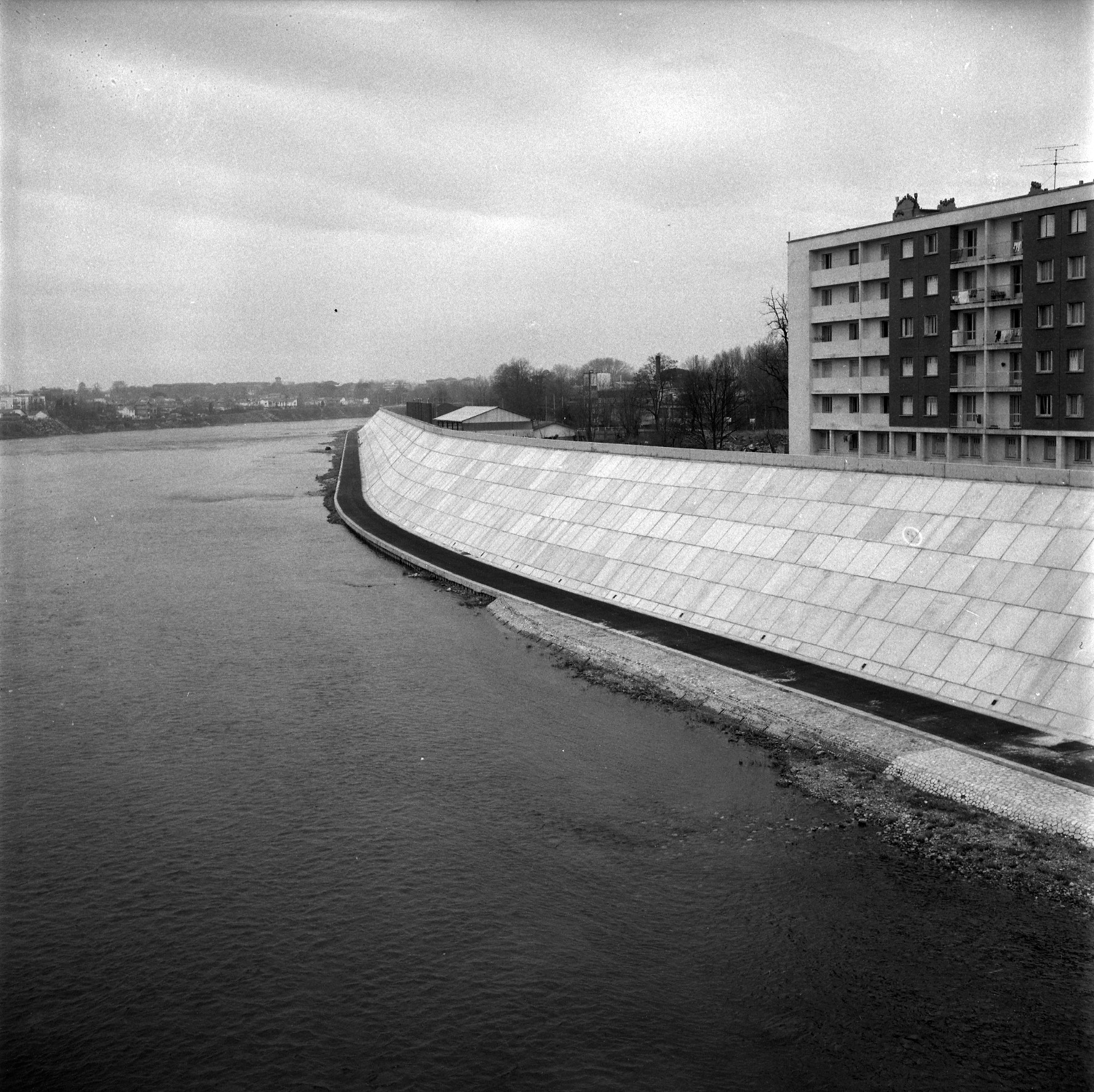 Pont des Catalans. Le 13 Févirer 1968. Vue des travaux de la digue du Pont des Catalans.